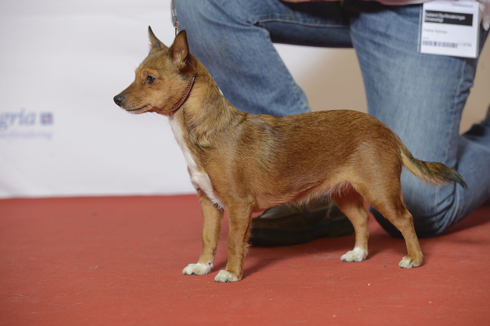 BIR Grupp 5 PODENGO PORTUGUES, LISO/PEQUENO SE UCH Tappinskis After You MyDOG, Nordens största hundevenemang